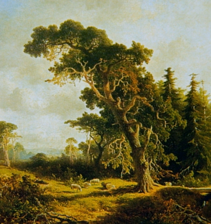 'Duizendjarige den'. Zeer oude grove den circa 1850 geschilderd door Johannes Warnardus Bilders die ook de naamgever is. De boom stond in Wolfheze bij hotel Wolfheze en is begin in 2006 omgevallen.